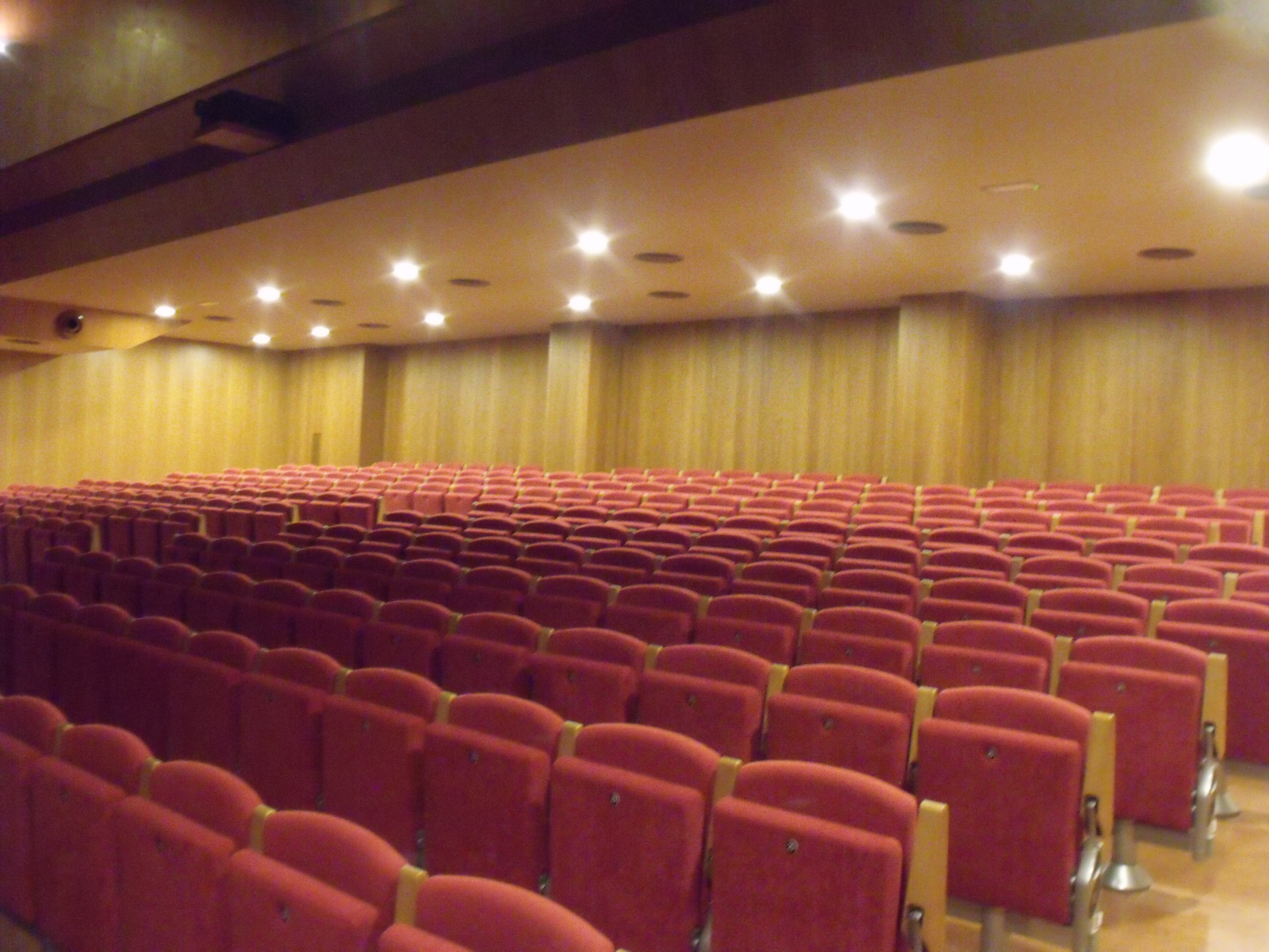 platea